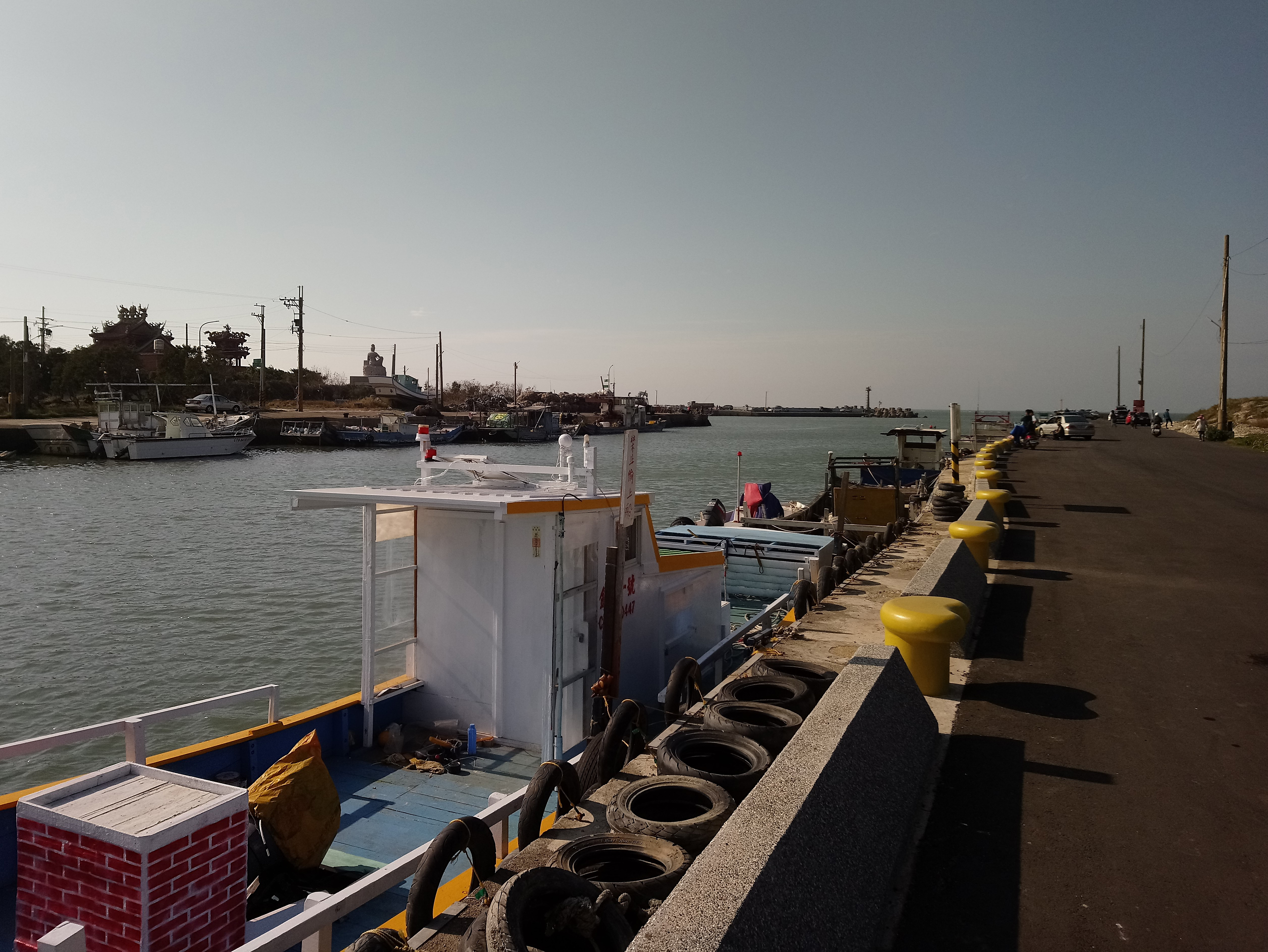 海山漁港內部,台灣省新竹市香山區香山聯里朝山里